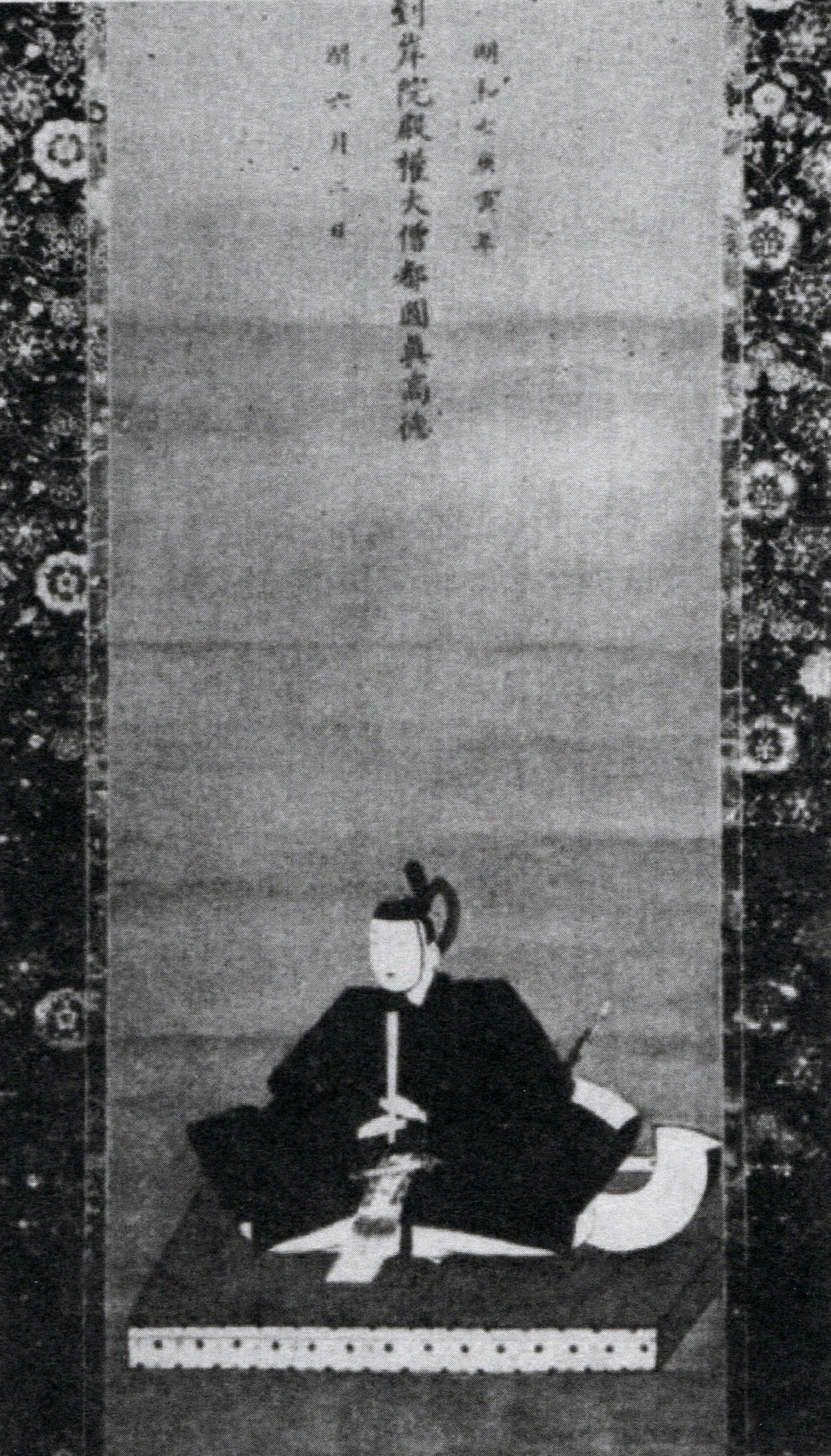 藤堂高悠の肖像(モノクロ)。